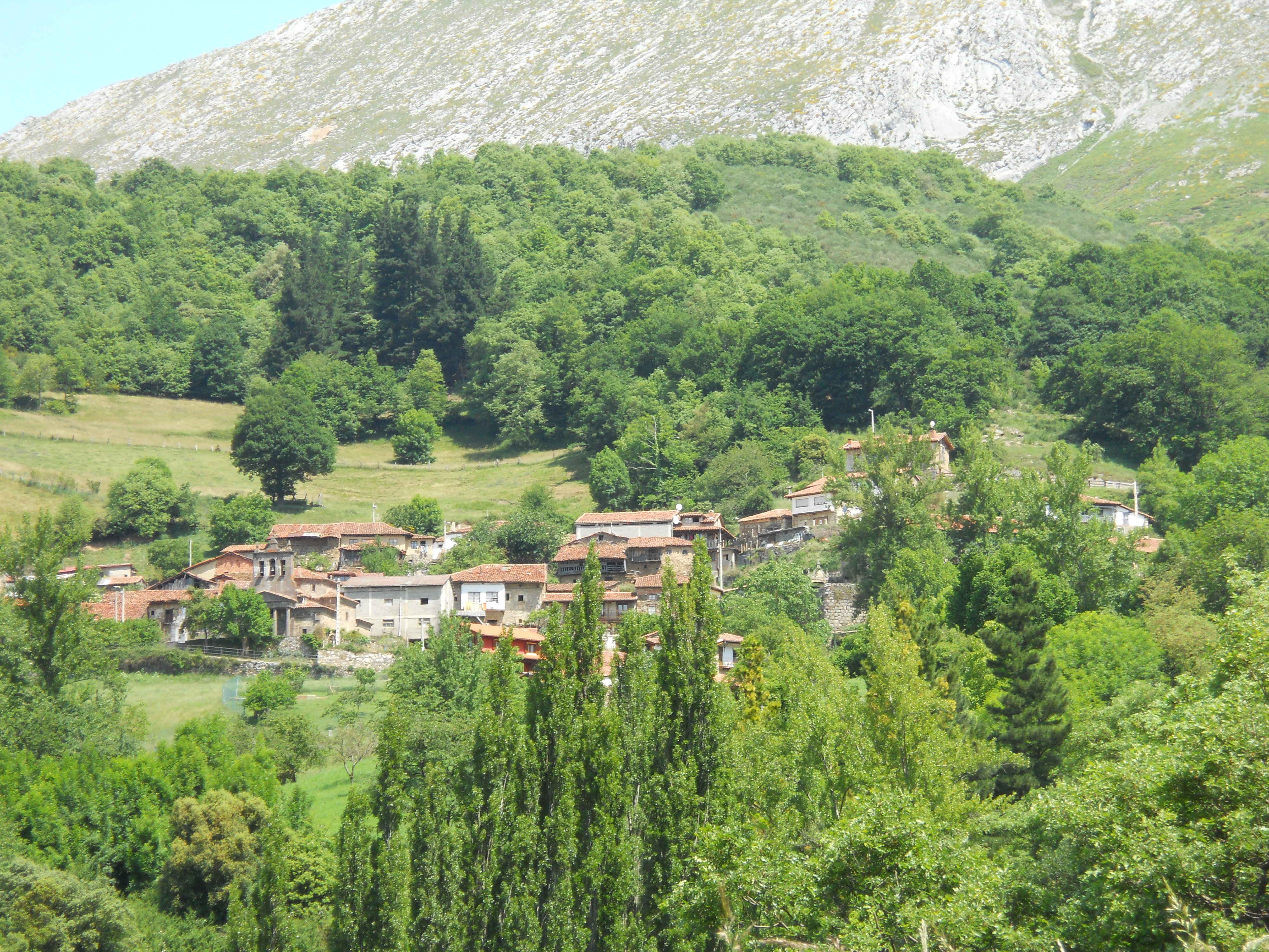 Salarzón - Municipio de Cantabria